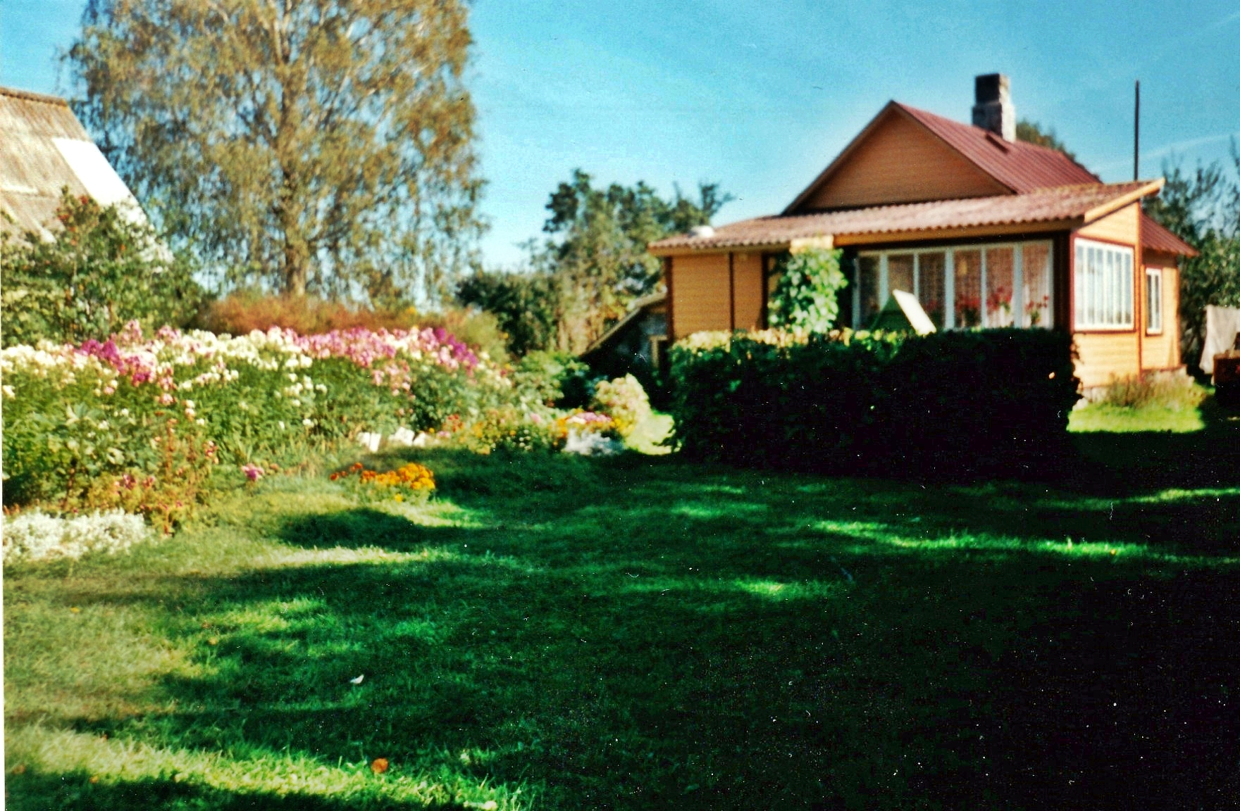 Kala-Jüri talu. Juurde ehitatud verandaga elumaja.